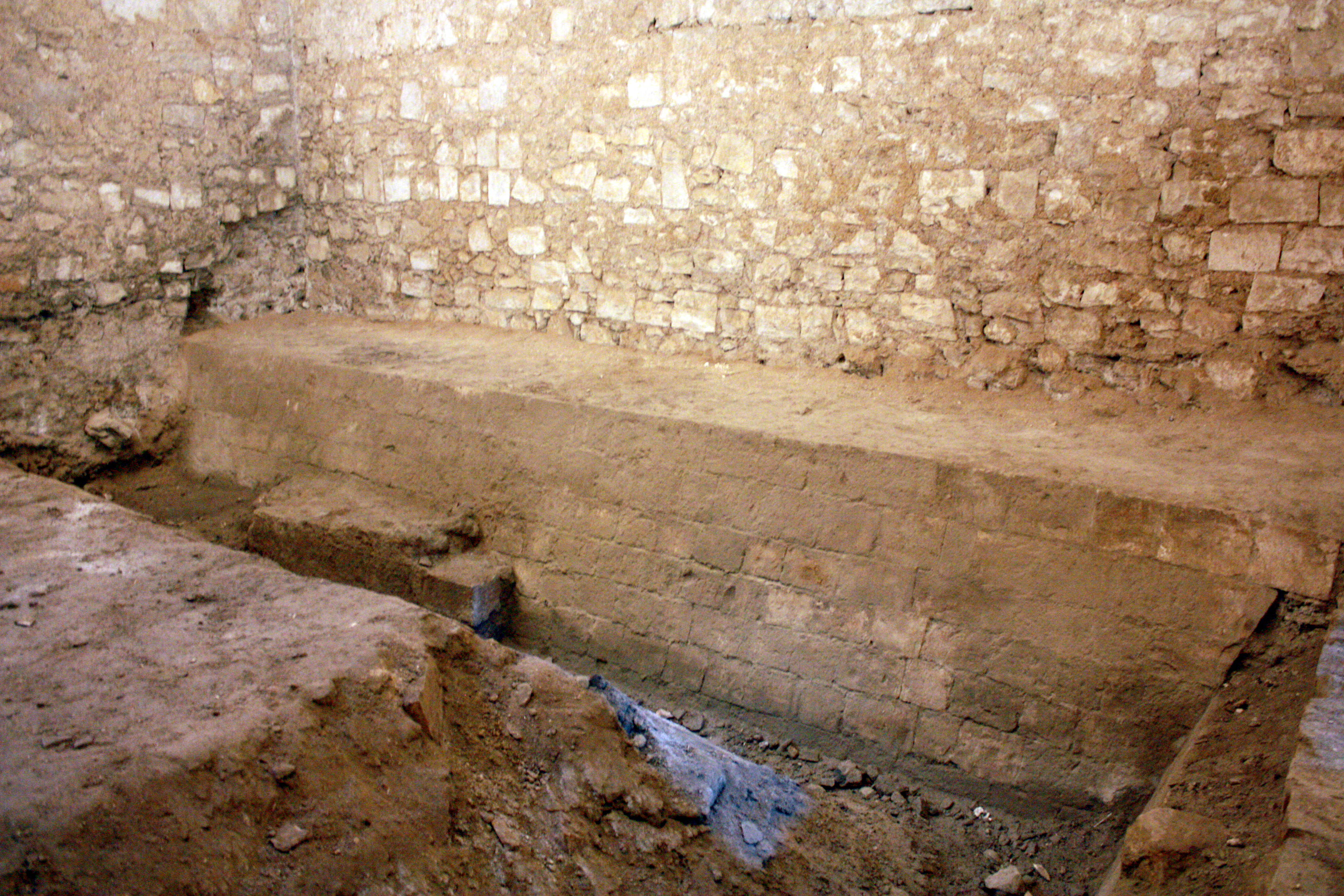 Castello di Barletta - Sotterranei - Frammento della cortina esterna del palatium angioino